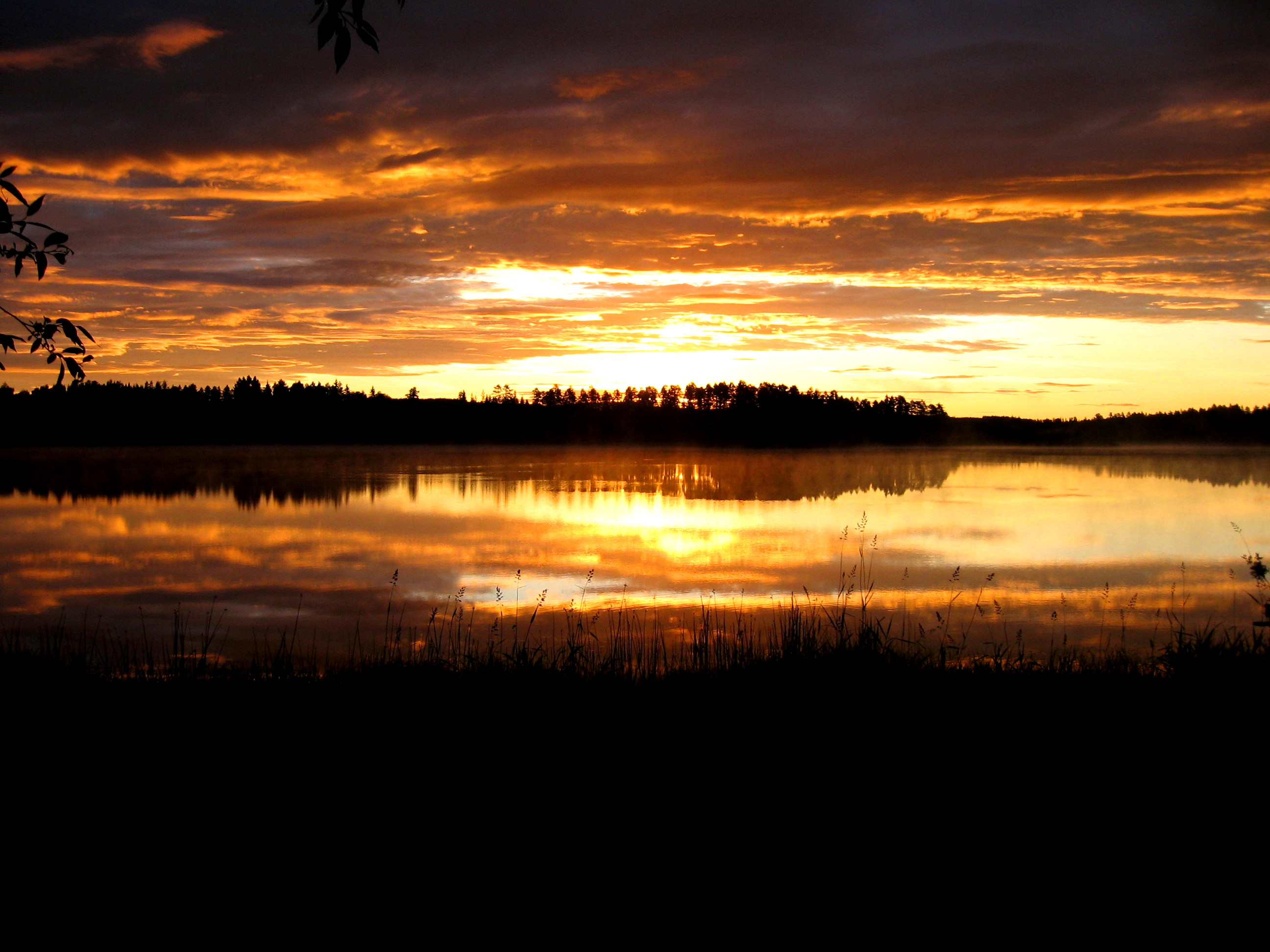 johannesholm